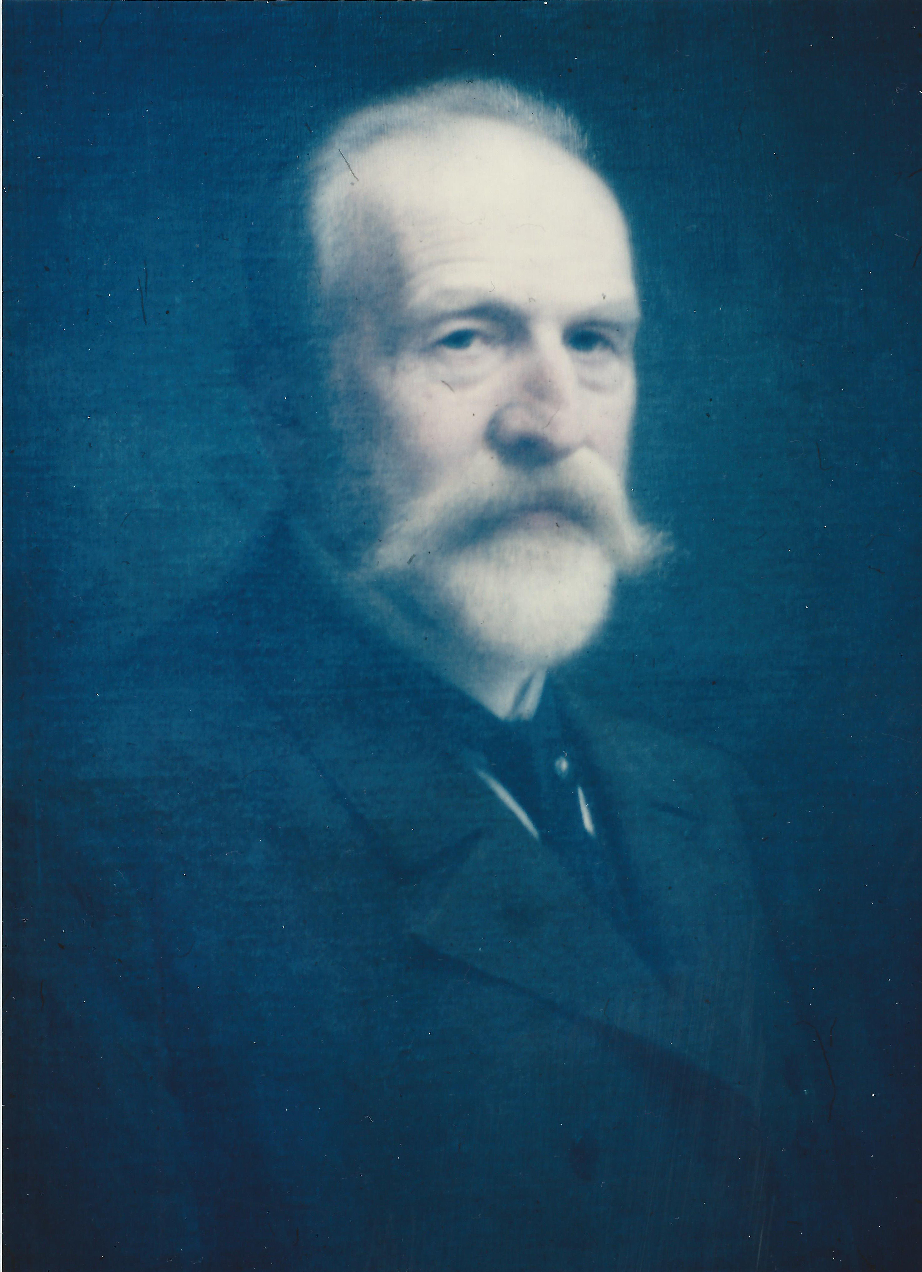 Ernst Bosch, Selbildnis 1910 (Privatbesitz)